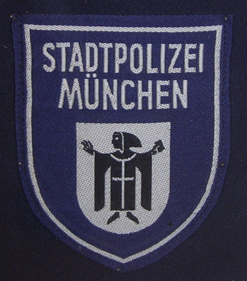 Ärmelabzeichen der Stadtpolizei München, ca. 1960 (Exponat der “Sonderausstellung 60 Jahre Bayerische Polizei” in Ingolstadt)